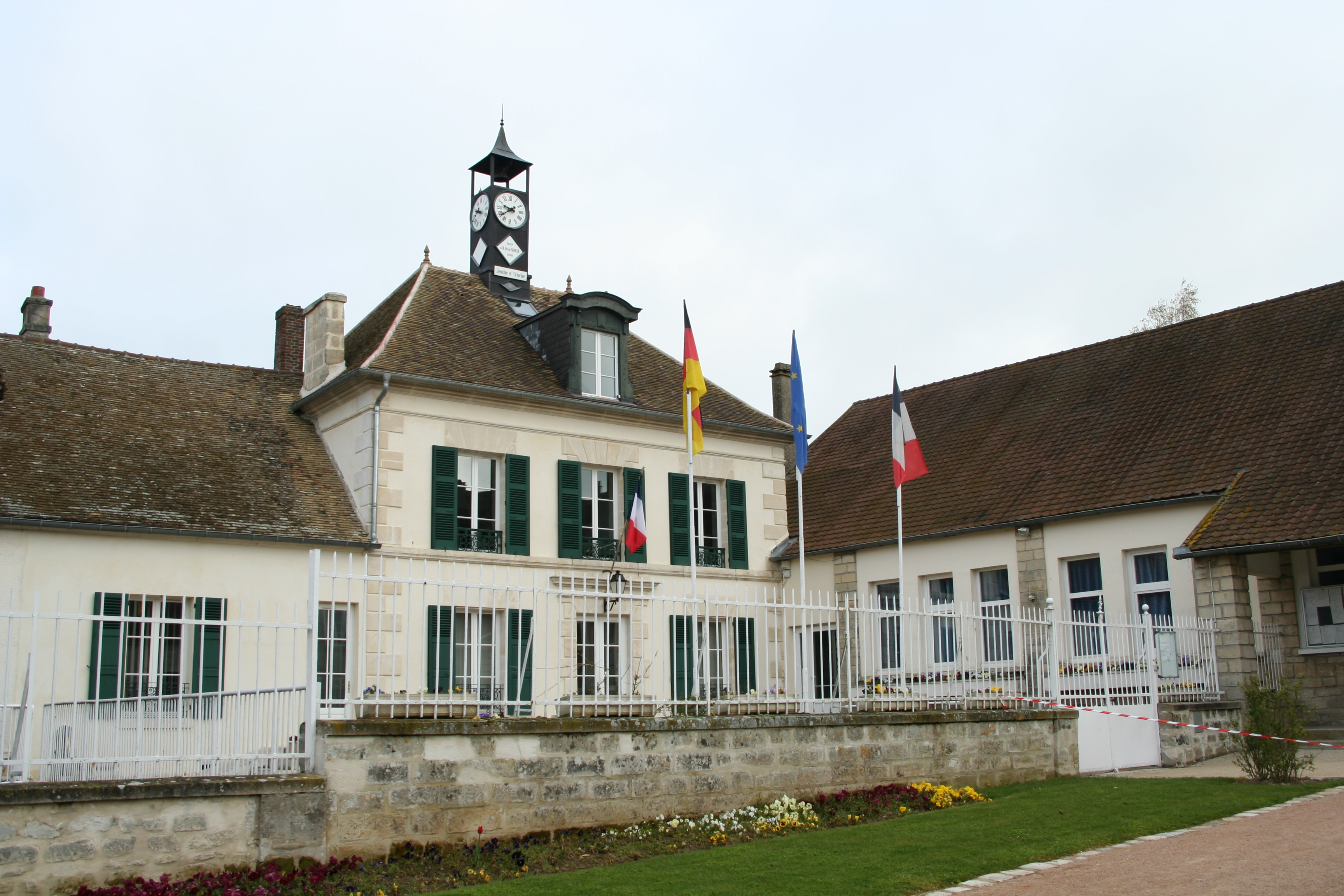 mairie de Nucourt, Val-d'Oise